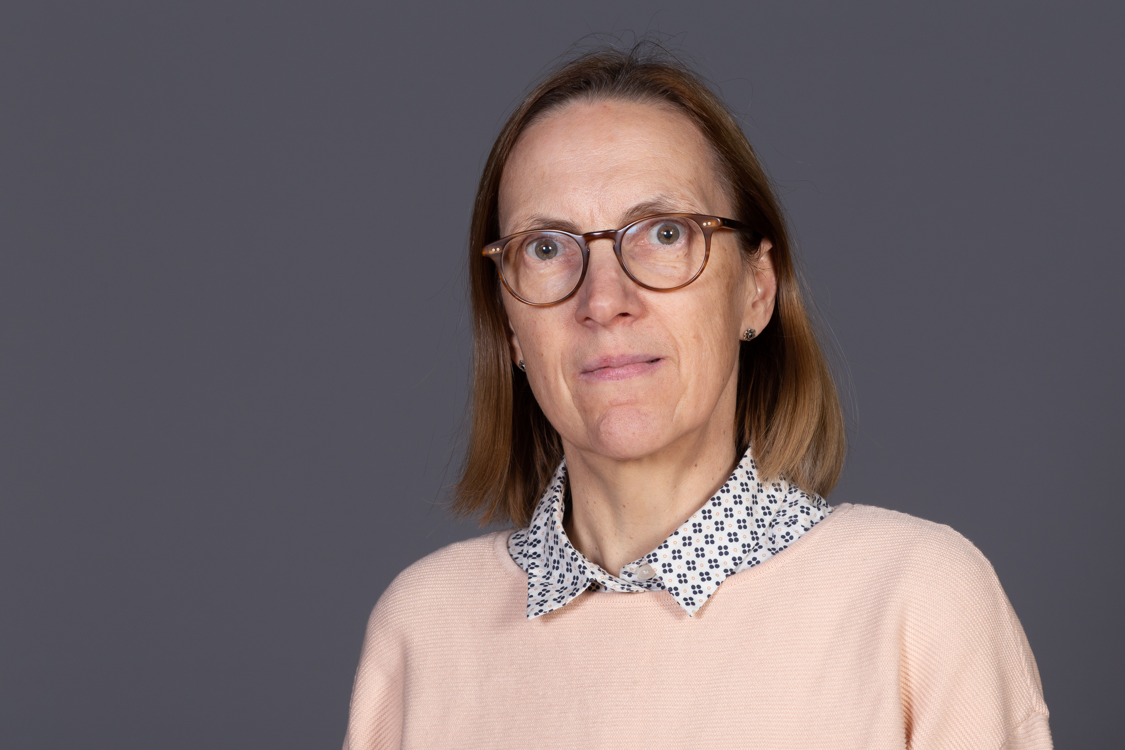 Abgeordnete(r) der Bürgerschaft der Freien und Hansestadt Hamburg Carola Ensslen